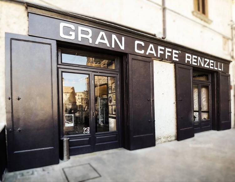 Lo storico Gran Caffè renzelli del 1803 nel centro storico di Cosenza